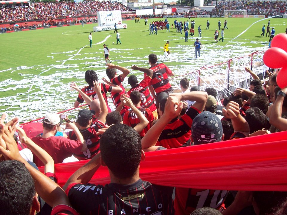 Torcida do Dragão no estadio Antonio Accioly